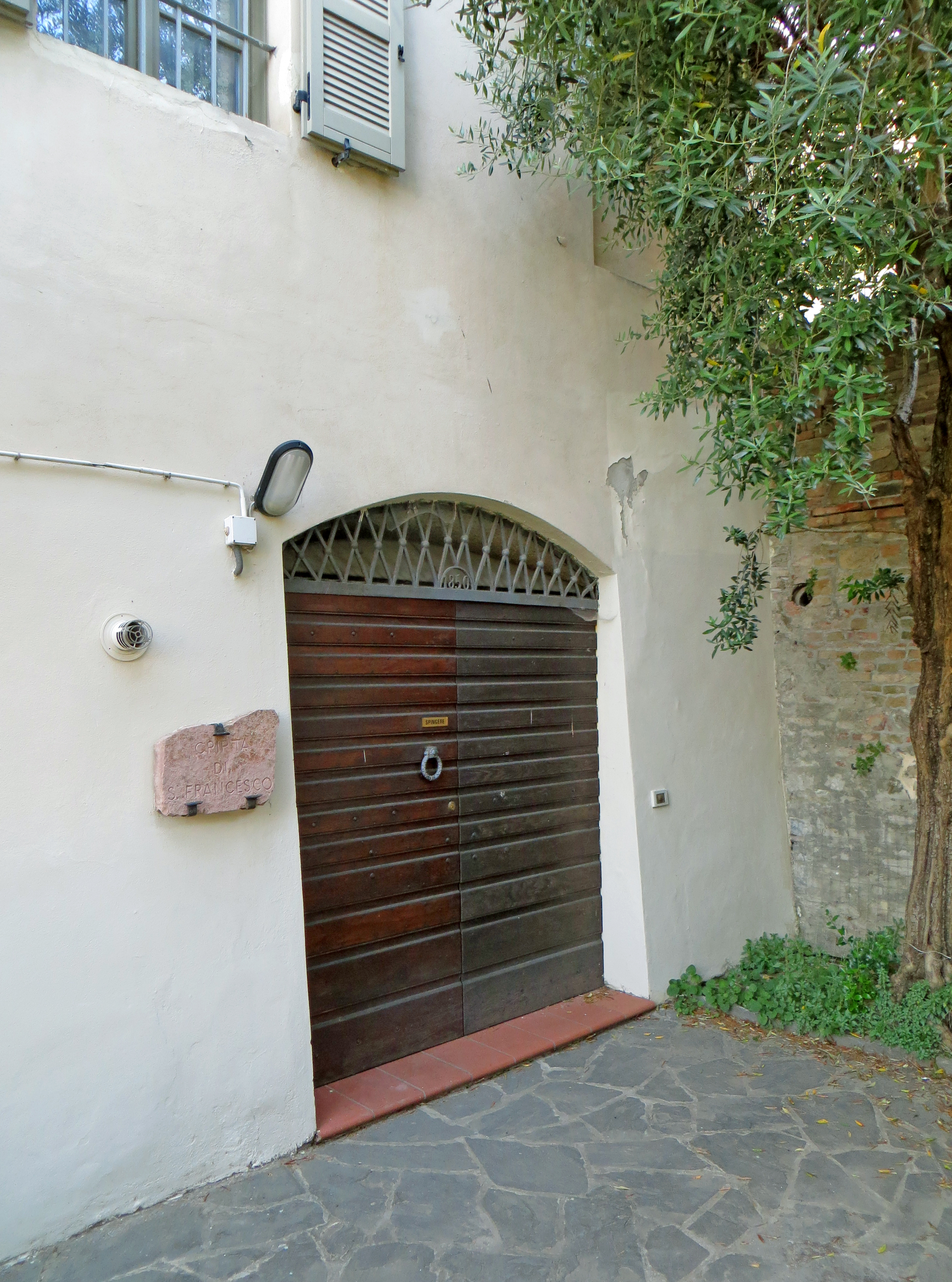 Chiesa di San Martino (Noceto) - ingresso alla cripta di San Francesco